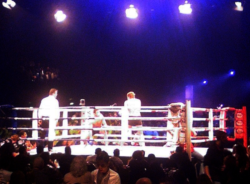 Alexander Emeilanenko op PRIDE & HONOR 2006, Ahoy', Rotterdam, NederlandAlexander Emeilanenko during PRIDE & HONOR 2006, Ahoy', Rotterdam, Netherlands